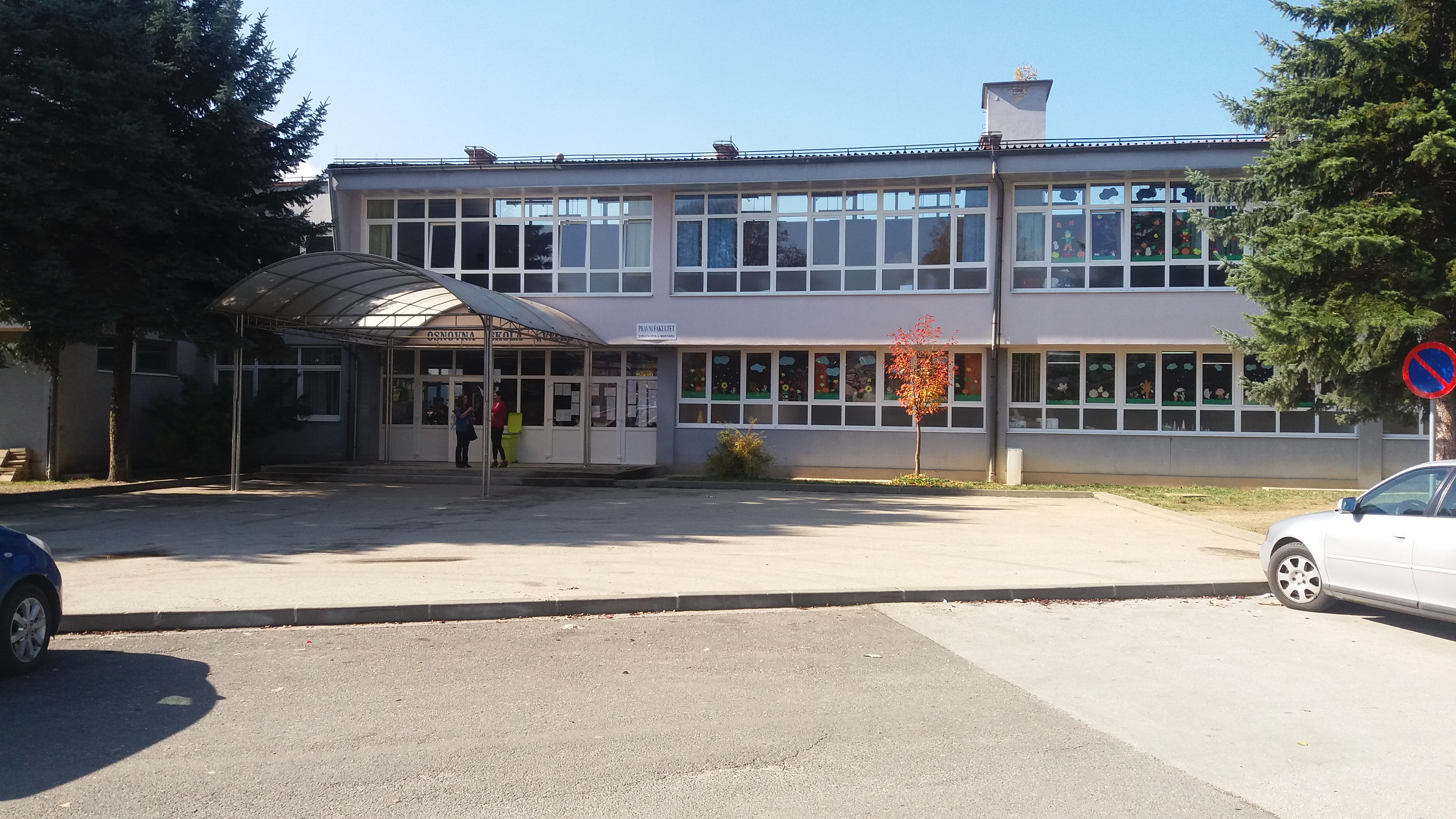 Osnovna škola Vitez